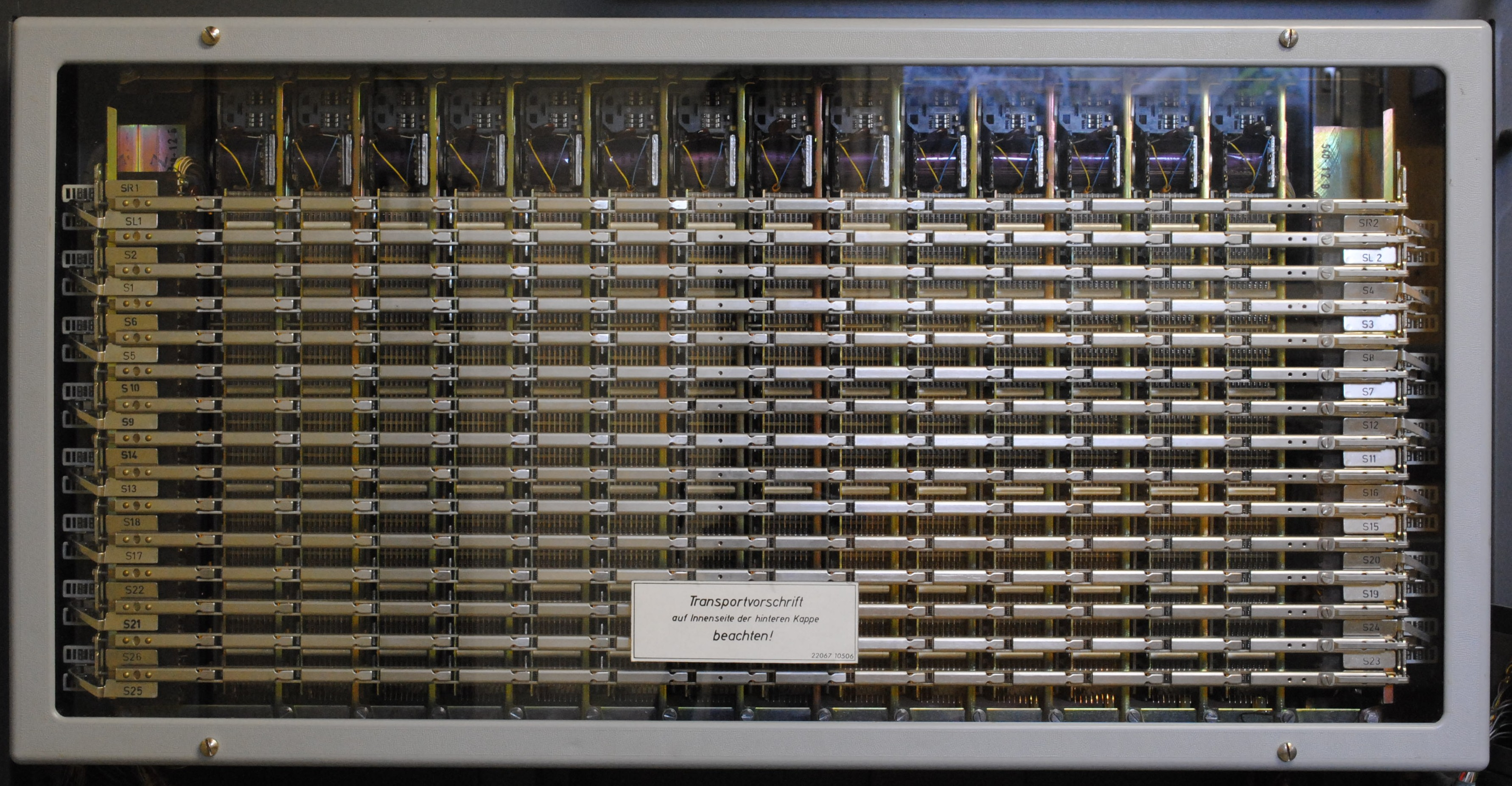 Dieser Koordinatenschalter befindet sich in einem Großcitomat des Herstellers SEL.